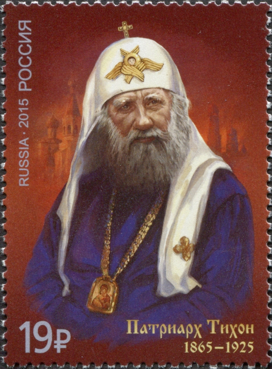 150 лет со дня рождения патриарха Тихона